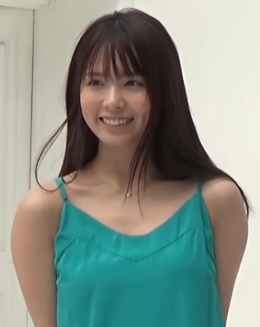 西村歩乃果です。